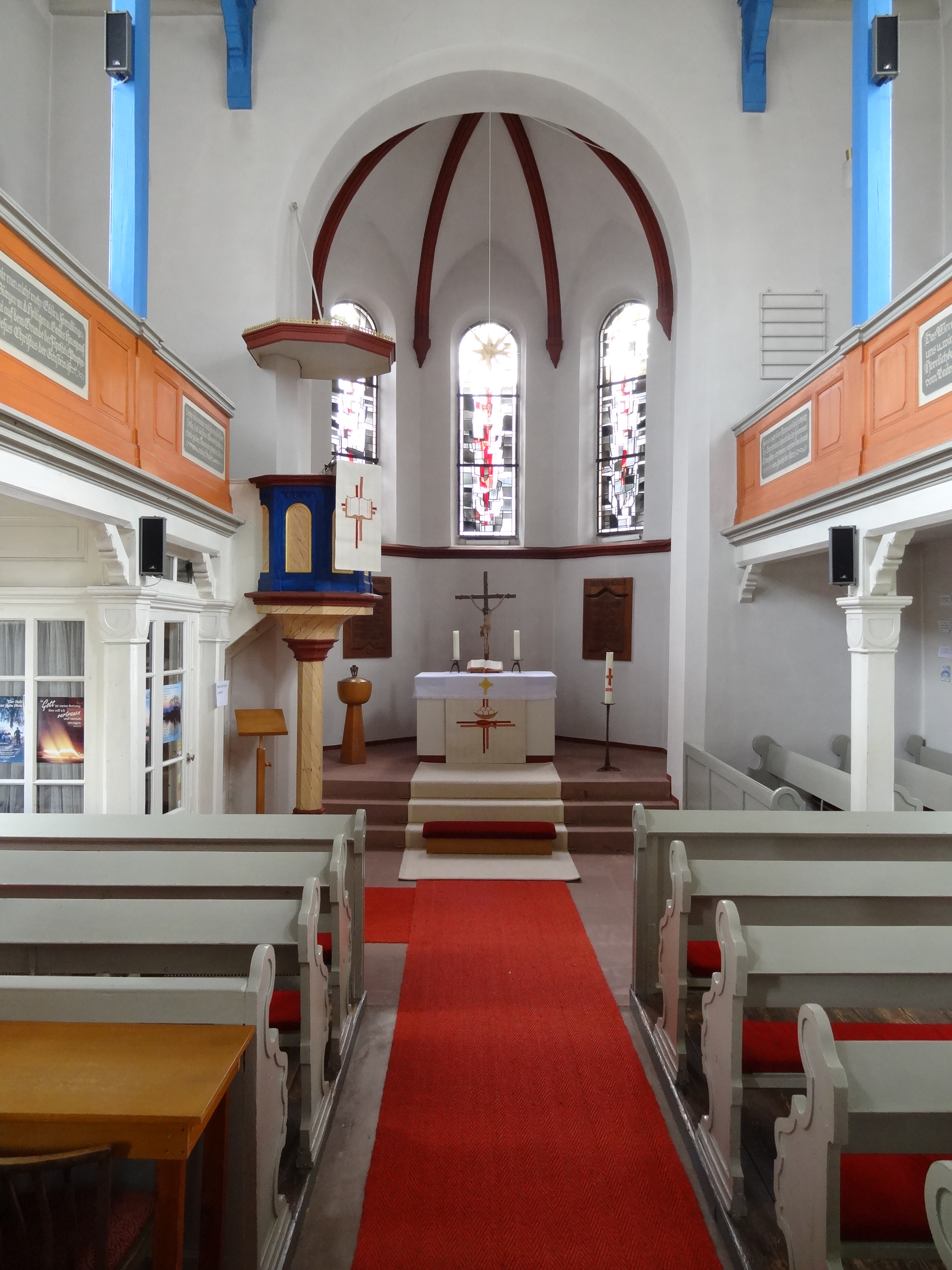 Evangelische Kirche Borsdorf